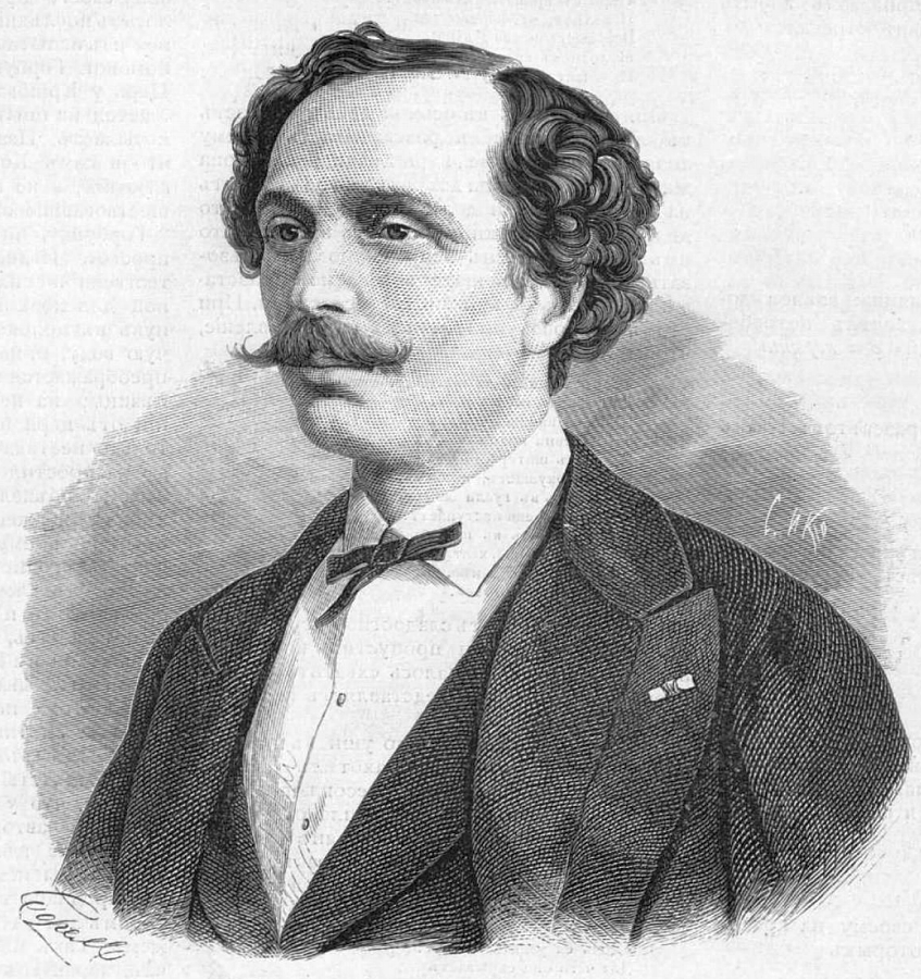 Петипа, Мариус Иванович